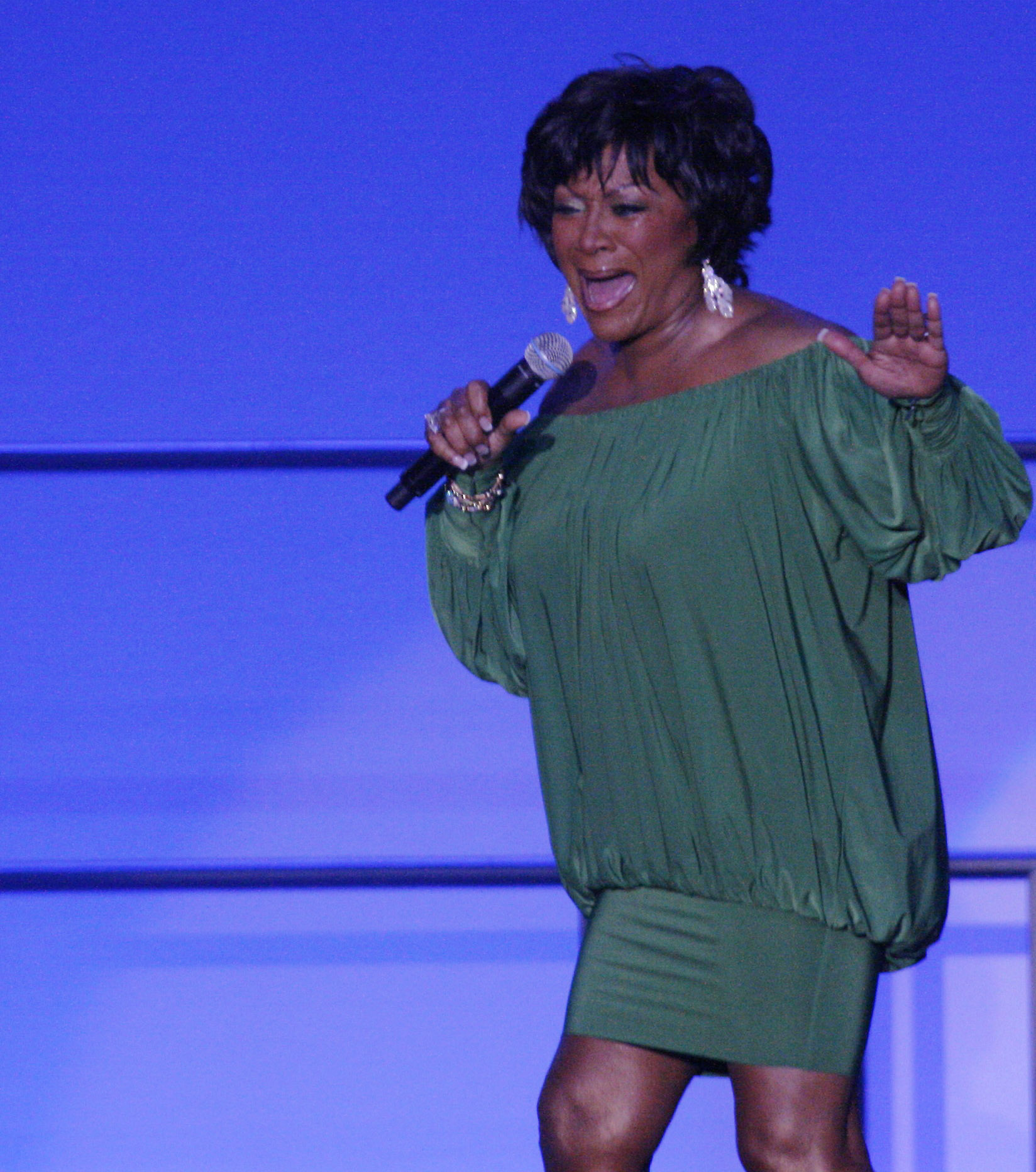 Patti LaBelle